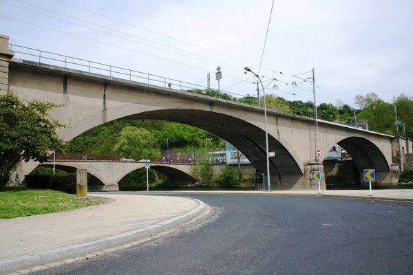 D'Eisebunnsbréck vu Waasserbëlleg Kategorie:Brécken iwwer d'Sauer Kategorie:Boubrécken Kategorie:Grenzbrécke Lëtzebuerg-Däitschland Kategorie:Eisebunnsbrécken Kategorie:Bauwierker 1861 Kategorie:Bauwierker 1950